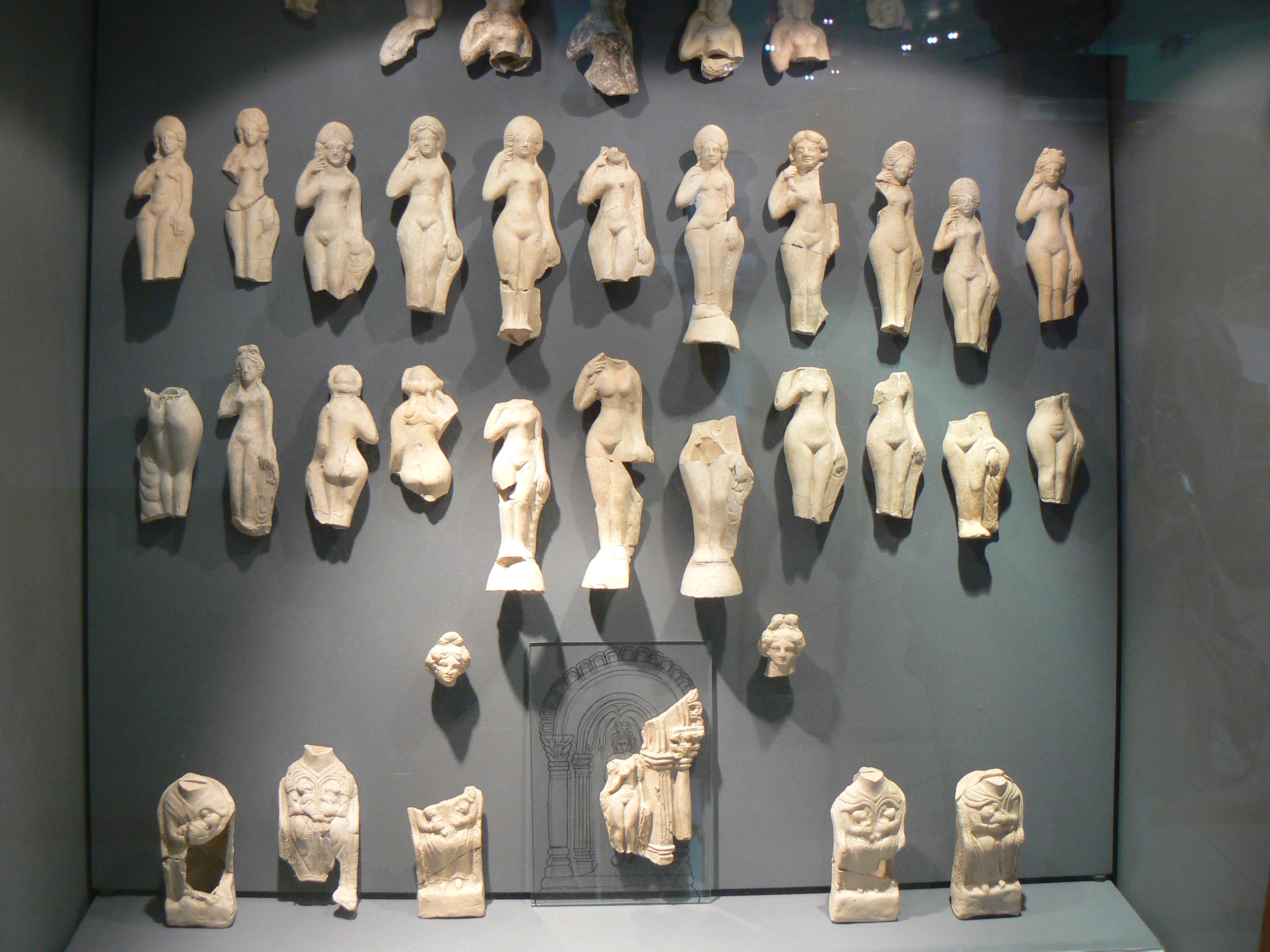 Figurines trouvées à proximité du sanctuaire de Jublains